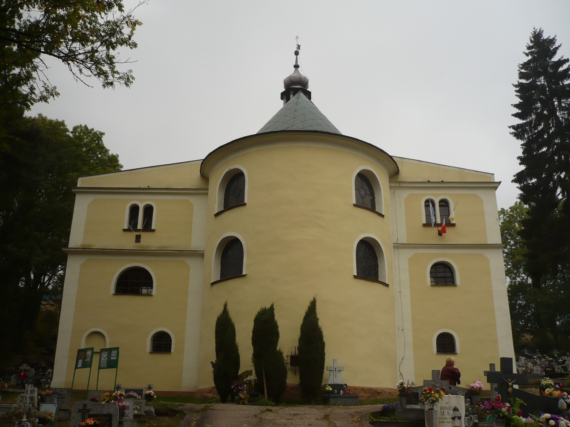 Ludwikowice Kłodzkie. Kościół pw. św. Michała Archanioła